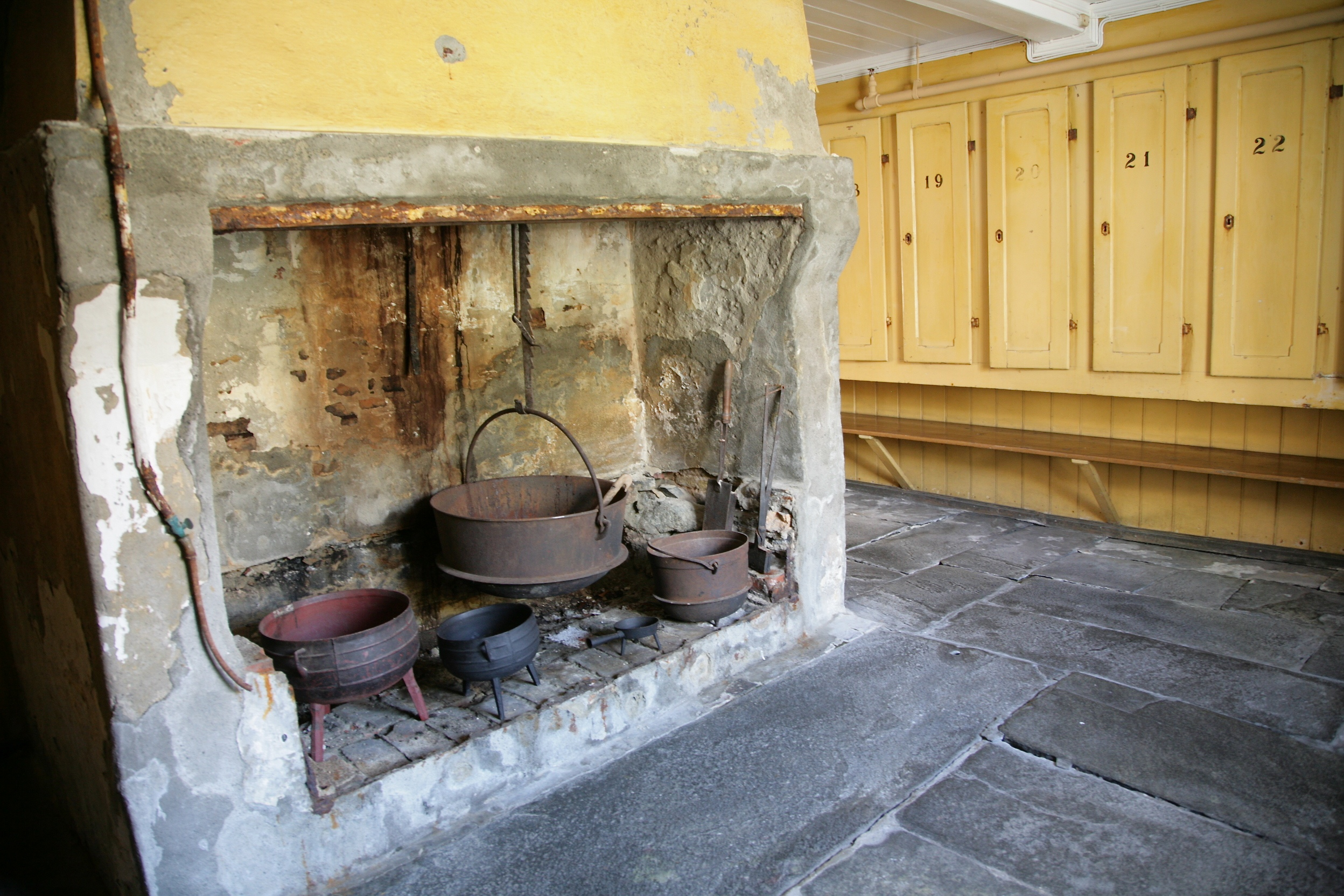 Lepramuseet i Bergen.